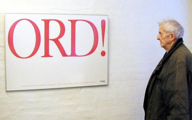 Kaj Øgaard Sørensen har netop afleveret manuskriptet til sin sidste trykte avis den 22. november 2007 i Vordingborg